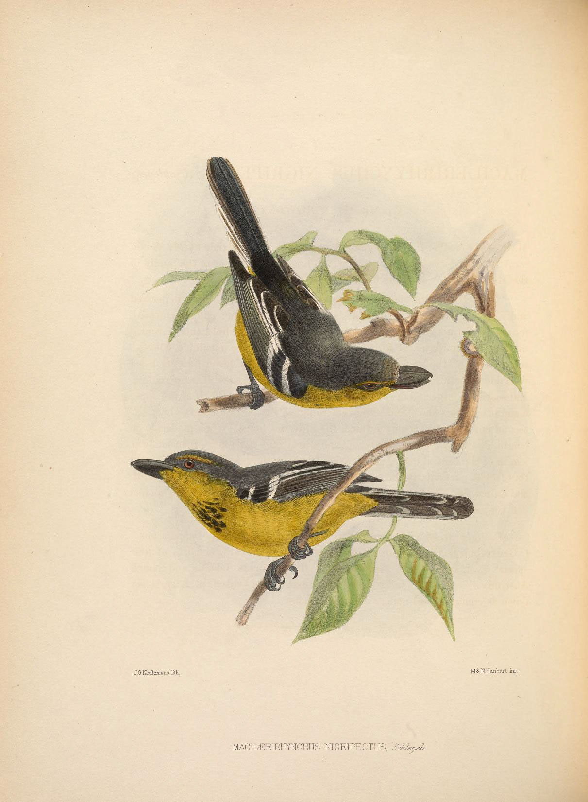 J.G.KeuLemans Ktli. M.9vNHanliart mip. MACH/ERIRHYITCHUS NI GRIPE CTUS, ScMe^^.